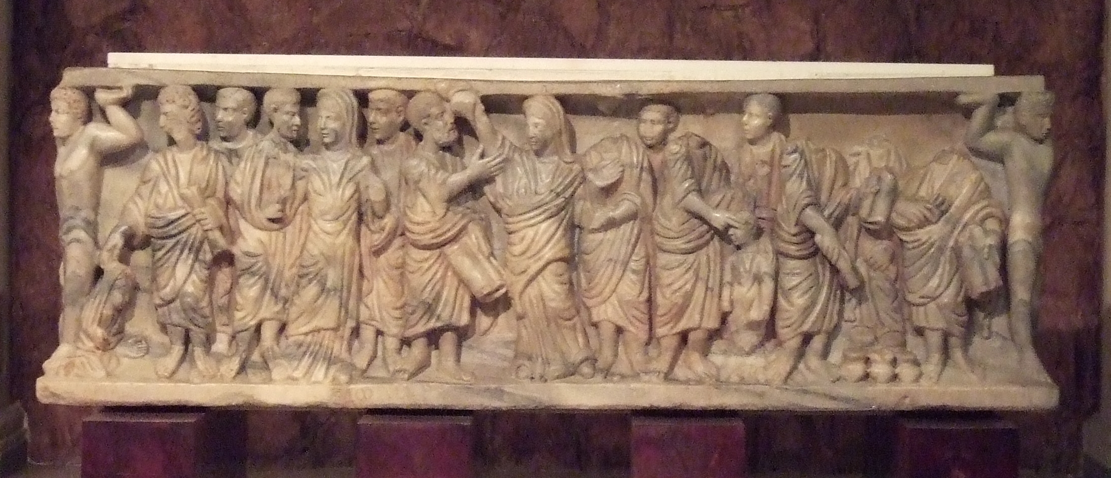 Sarcófago de la Receptio animae (s. IV), arte paleocristiano. Representación de escenas bíblicas. Se encuentra en la Basílica de Santa Engracia.